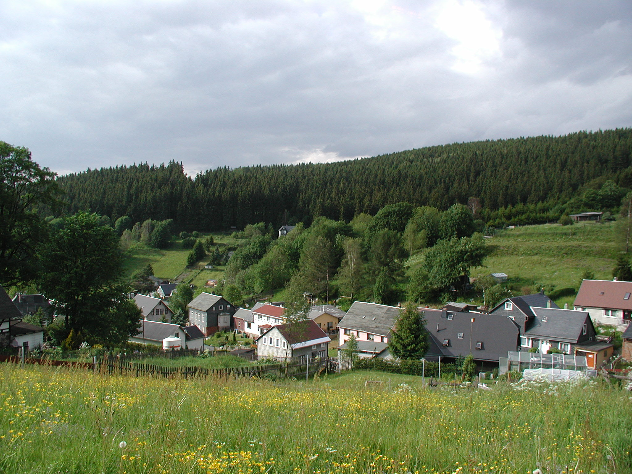 Stuetzerbach